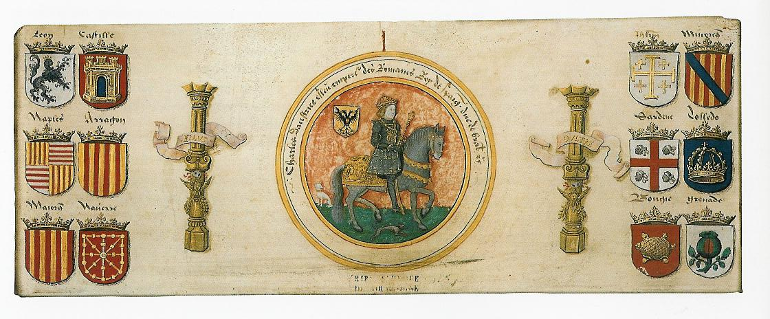 Regni di Carlo V